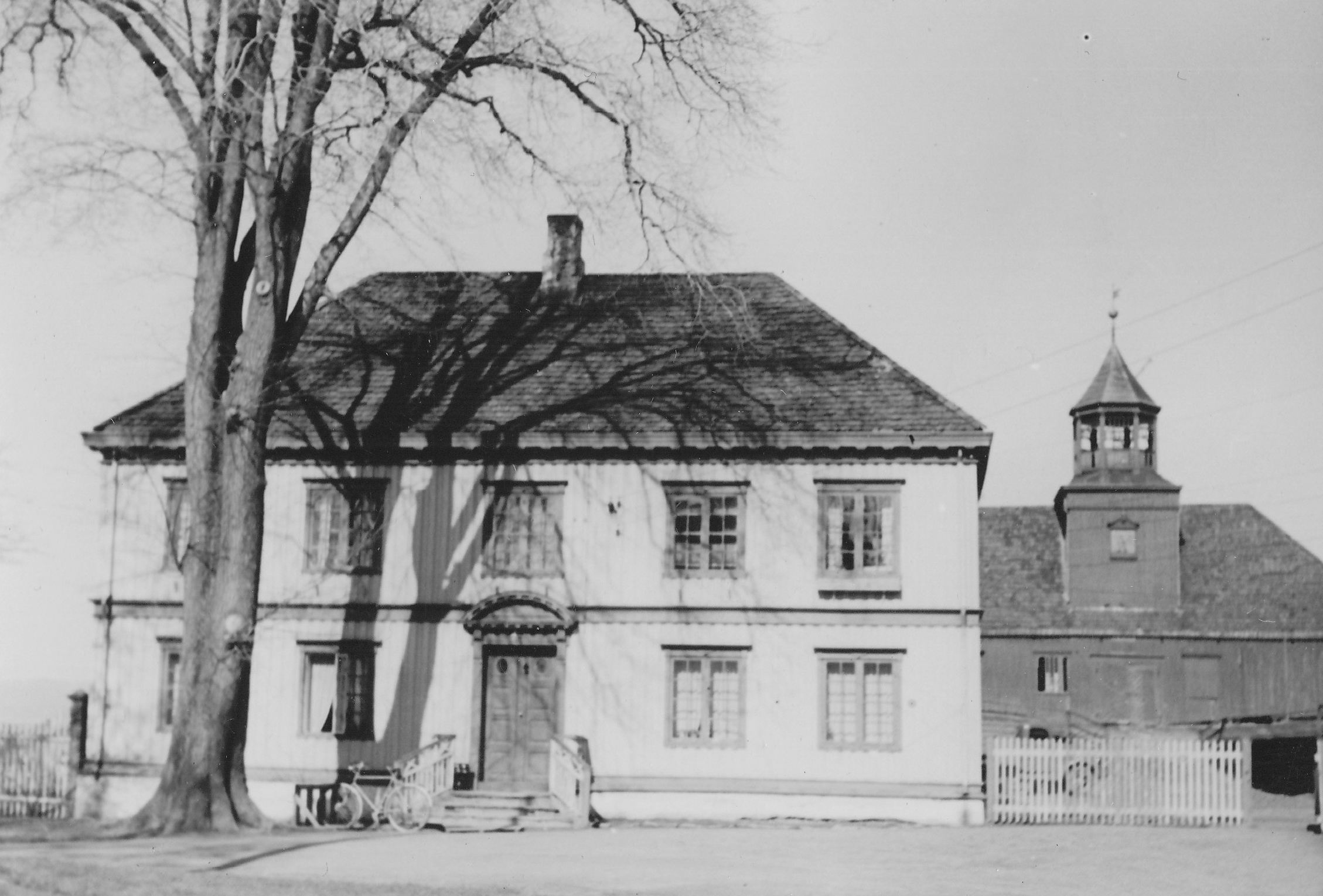 Format: Fotopositiv Dato / Date: ukjent Fotograf / Photographer: ukjent Sted / Place: Trondheim Eier / Owner Institution: Trondheim byarkiv, The Municipal Archives of Trondheim Arkivreferanse / Archive reference: Tor.H41.B31.F2321 Merknad: Lade gård; de norske kongers eldste sete, hvorifra Trondheim ble grunnlagt.